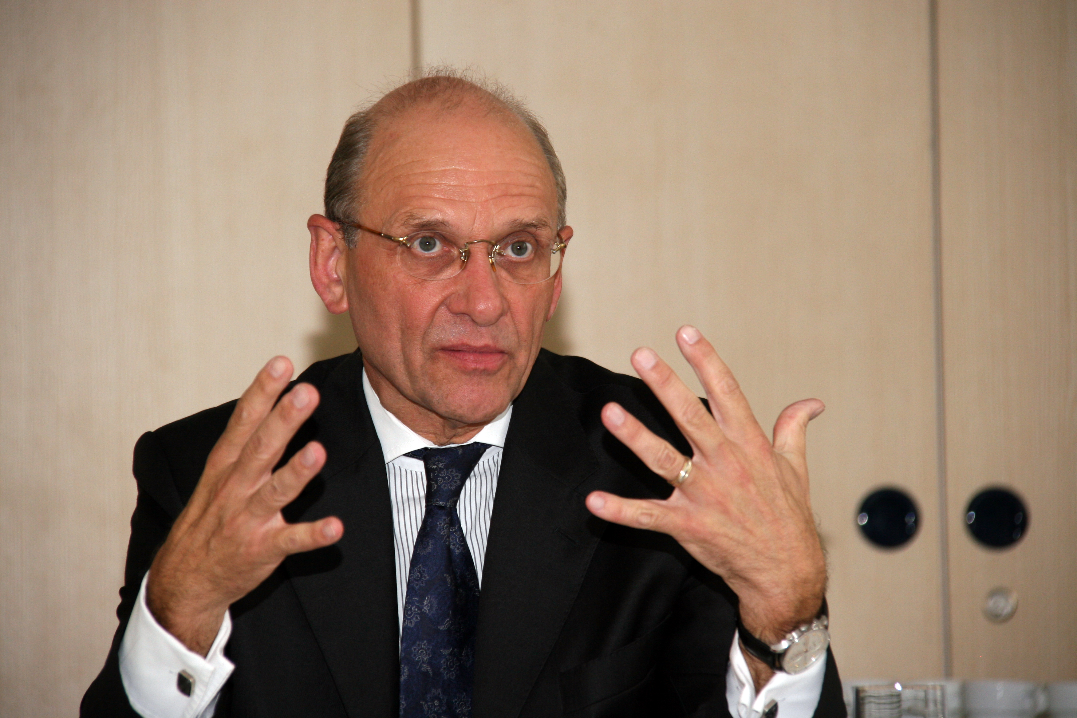 Staatssekretär im Bundesministerium für Gesundheit 2001 - 2009: Dr. Klaus Theo Schröder, Juli 2009 am Klinikum Fürth